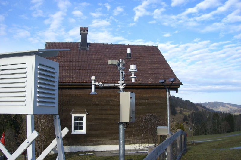 Sensoren für die Meteorologie